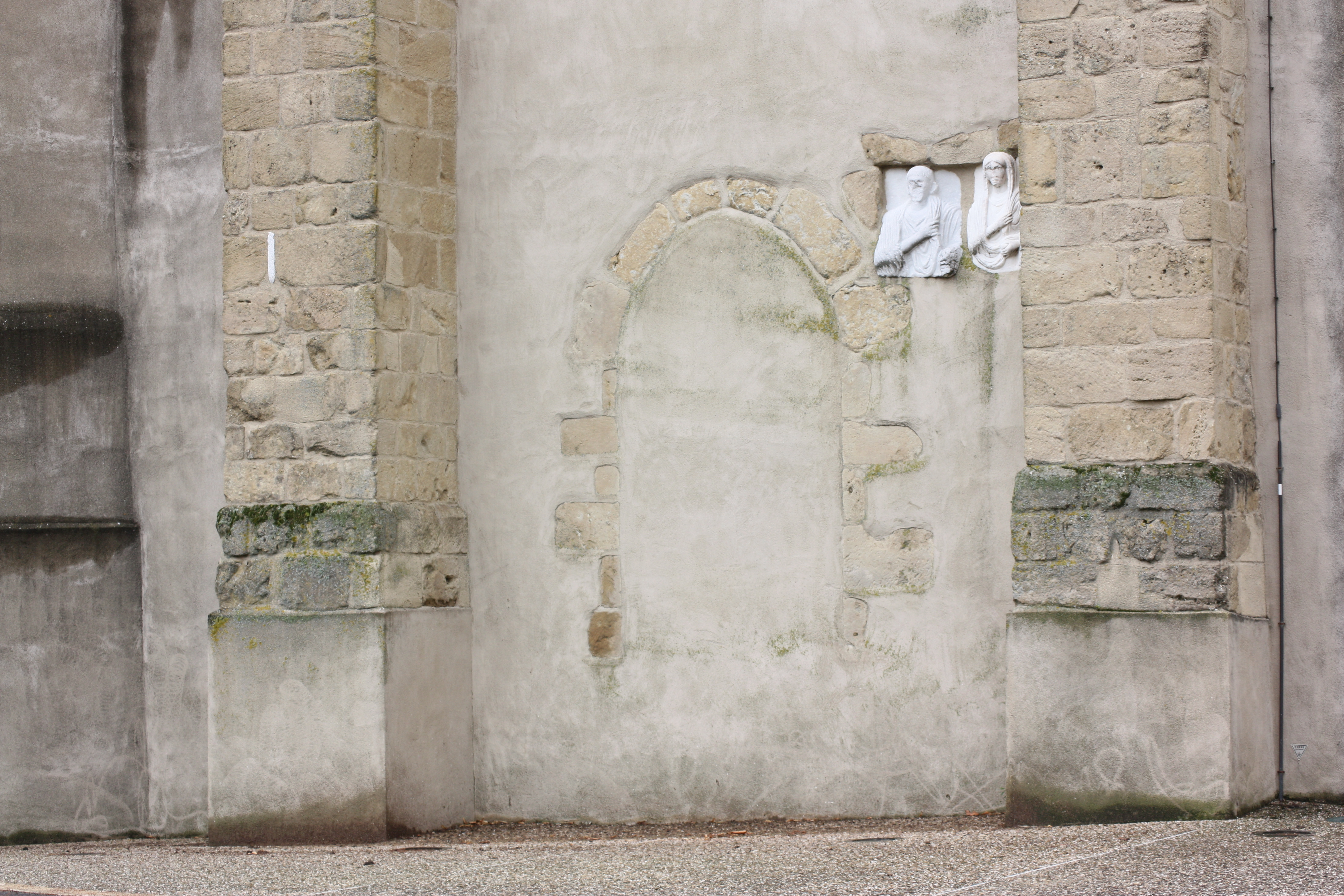 Façade de l'église. Superbes réemplois